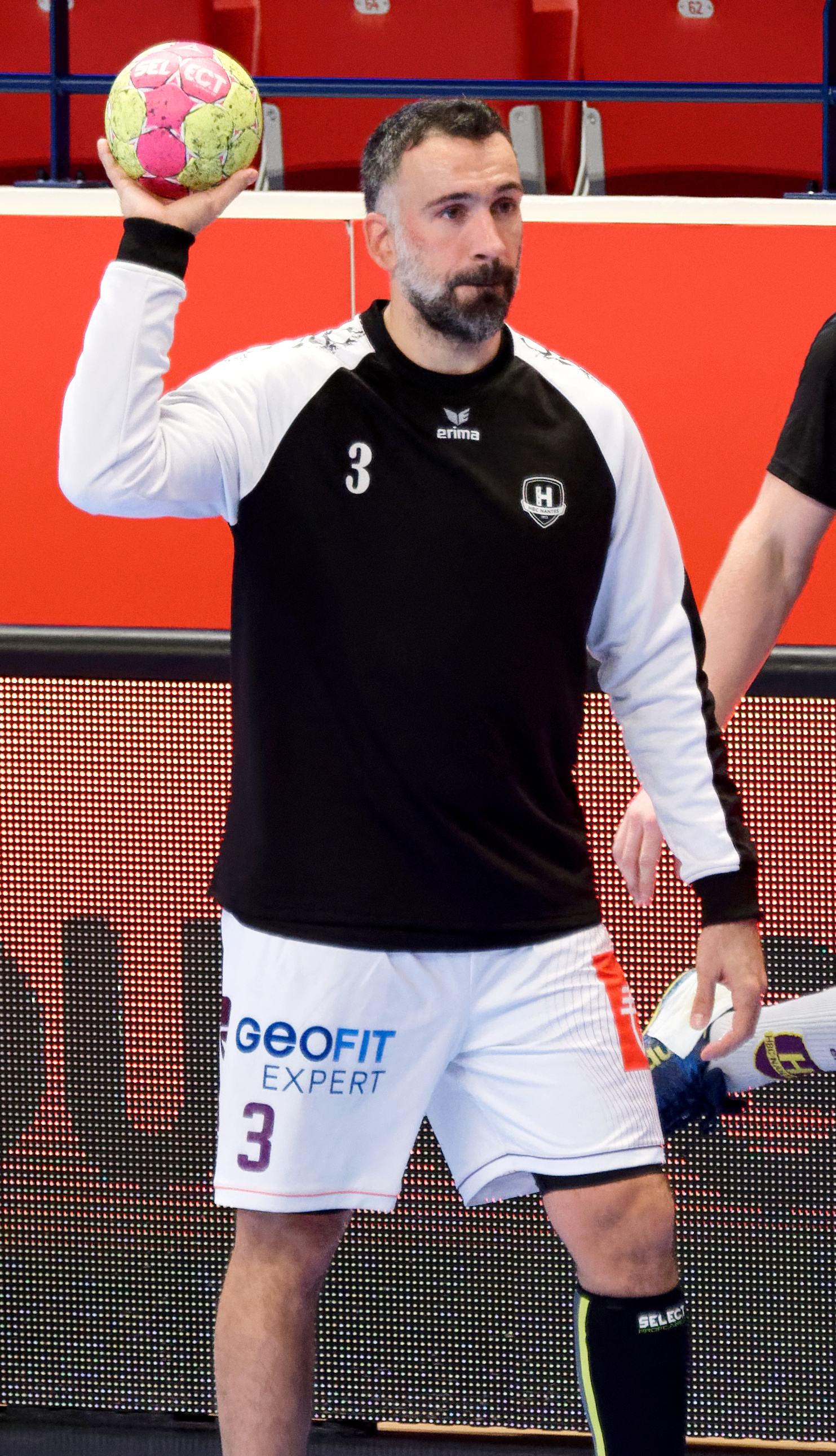 Quart de finale de la Coupe de la Ligue entre le PSG et le HBC Nantes. A Coubertin, le 14 décembre 2017.